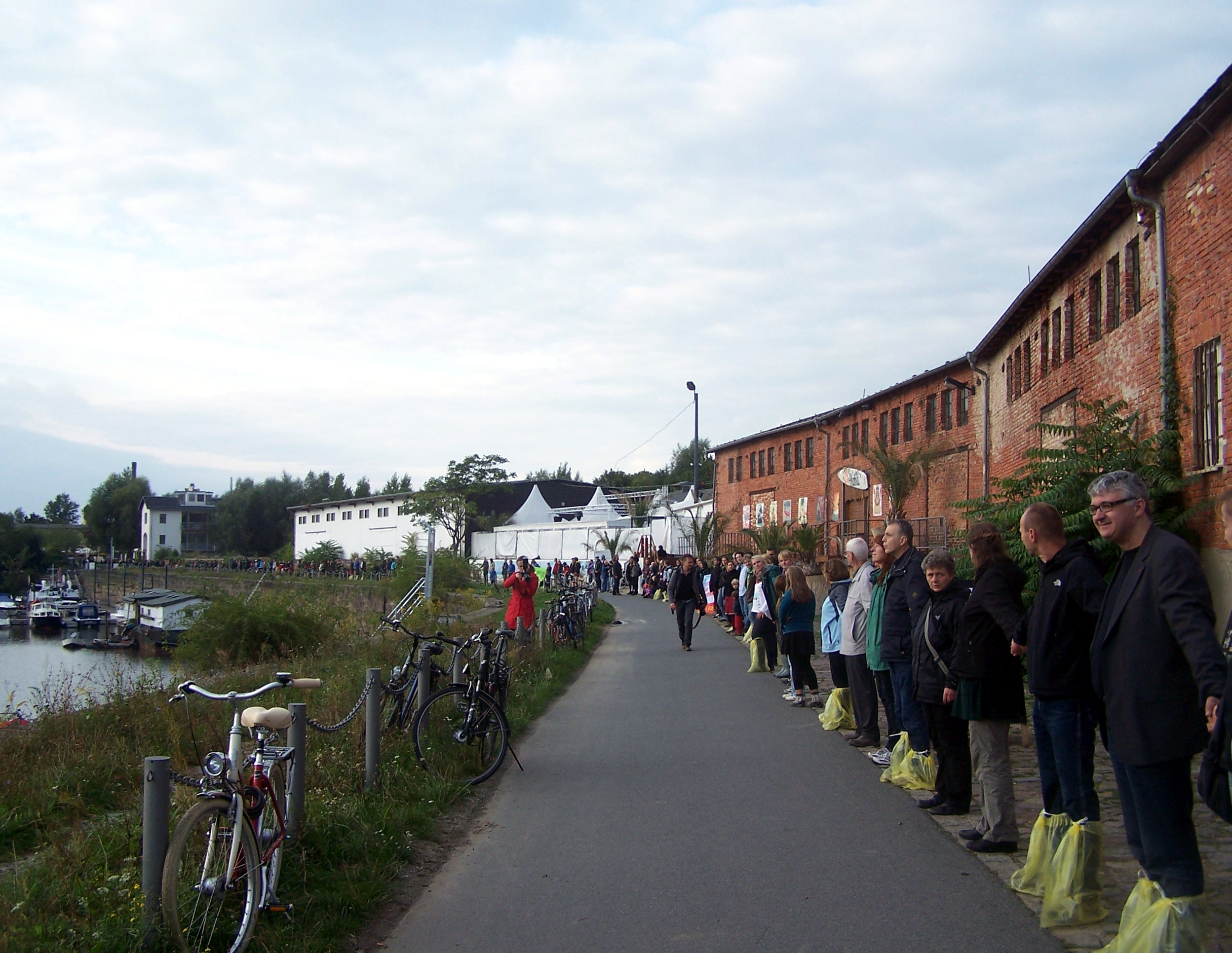 Dresden, Menschenkette am Neustädter Hafen aus Protest gegen das Projekt Hafencity